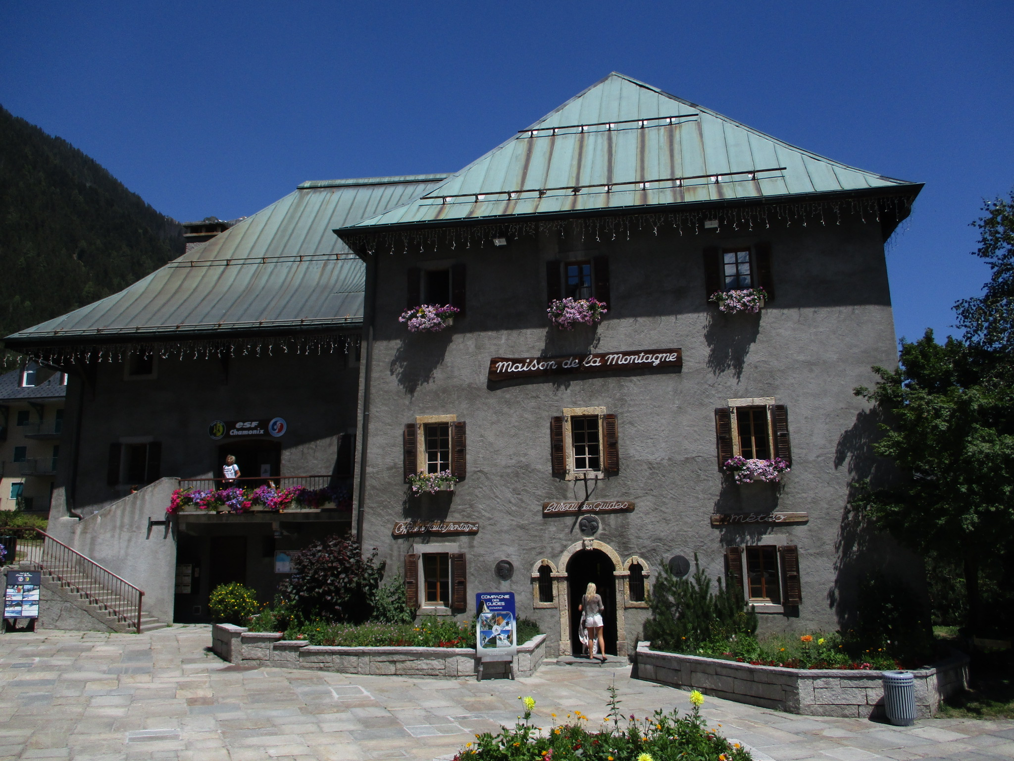 Maison de la montagne de Chamonix - Ancien presbytère de Chamonix-Mont-Blanc